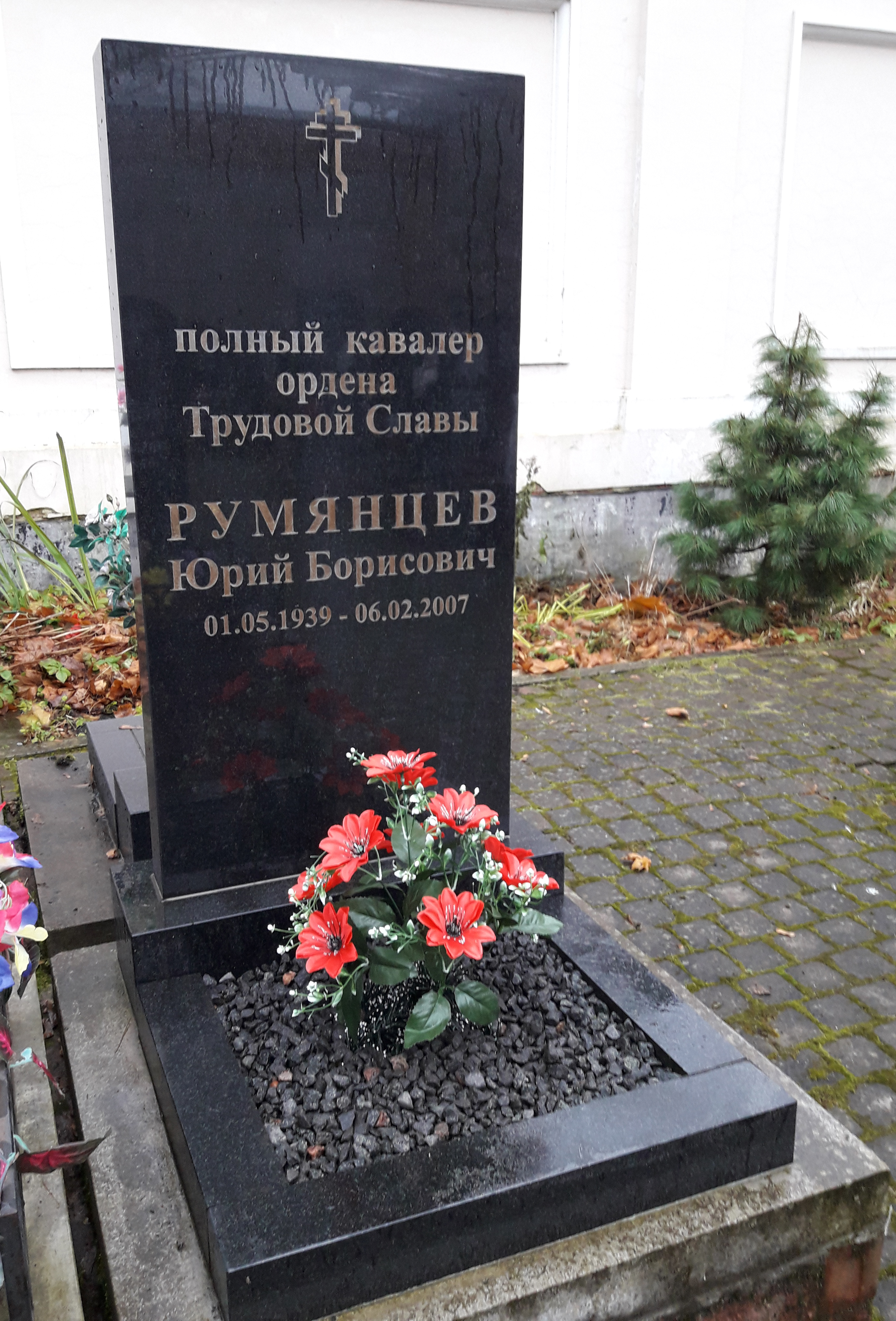 Надгробие Румянцева Юрия Борисовича на Новодевичьем кладбище Санкт-Петербурга